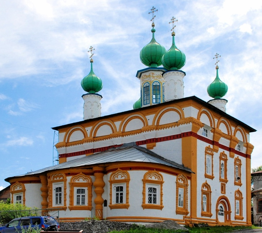 Отреставрированная в 2011 году Спасская церковь, г. Соликамск